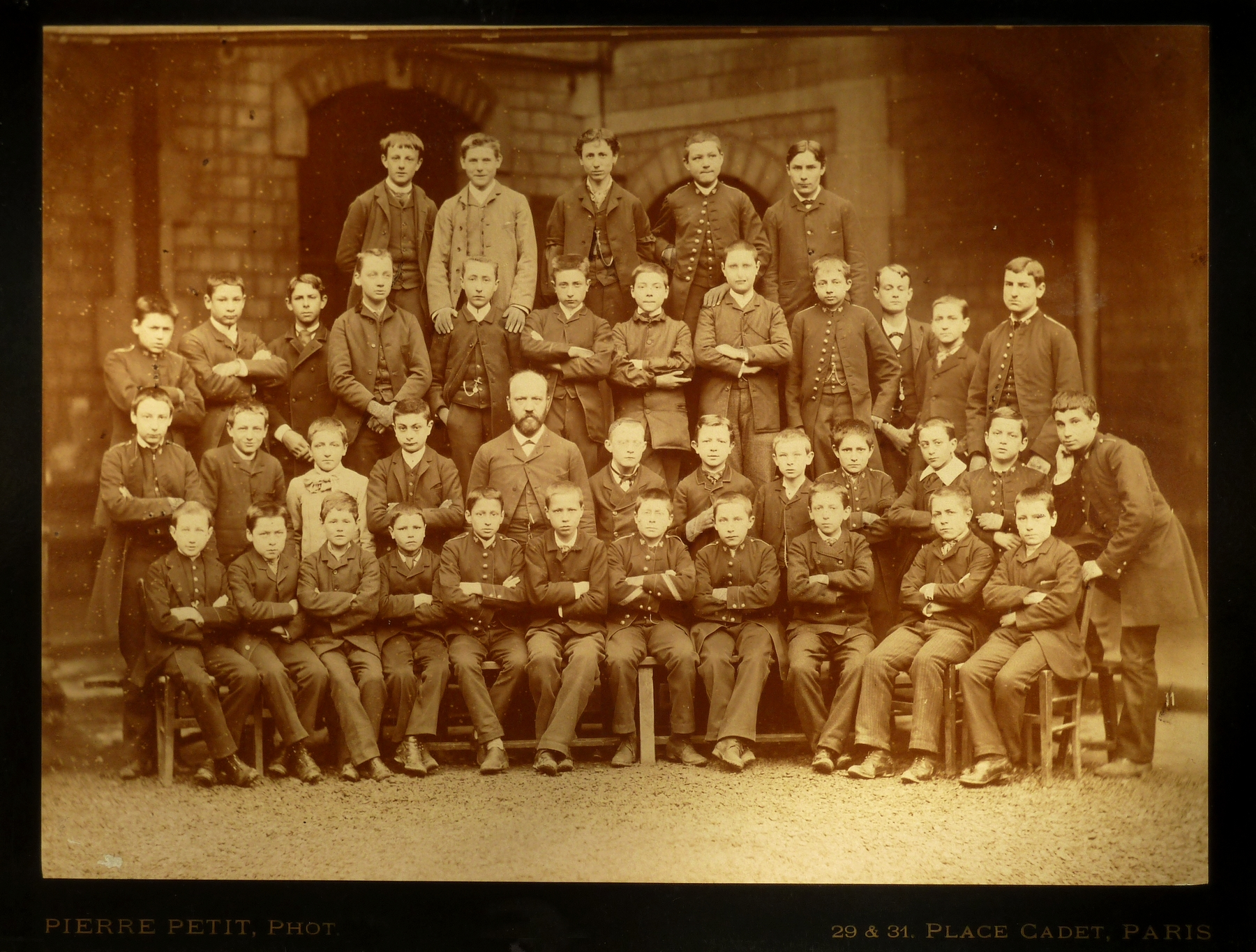 Photo de classe, lycée Chaptal à Paris vers 188O . Photographe Pierre Petit. Dimension cliché : 26 x 19 cm. Collection privée.